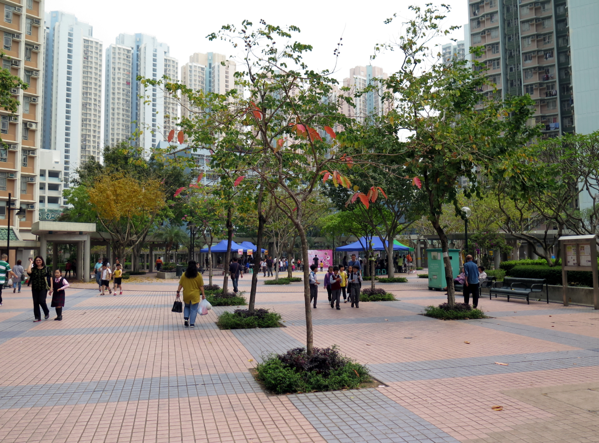 Tin Fu Court Plaza